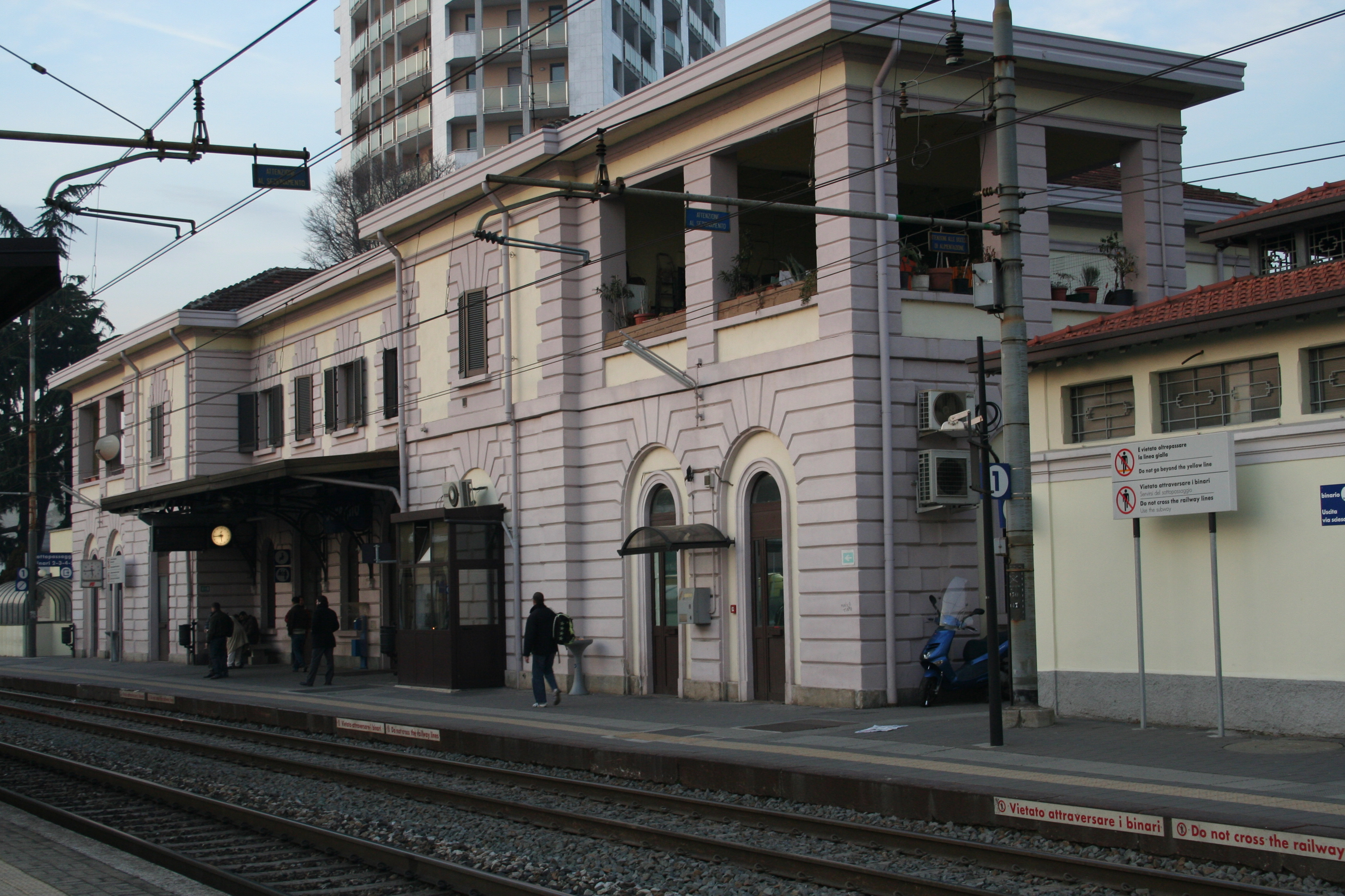 Stazione ferroviaria di SeregnoAll'estrema sinistra della foto si può notare la scala d'accesso al sottopassaggio pedonale, mentre in primo piano a destra vi è il fabbricato dei servizi igienici.